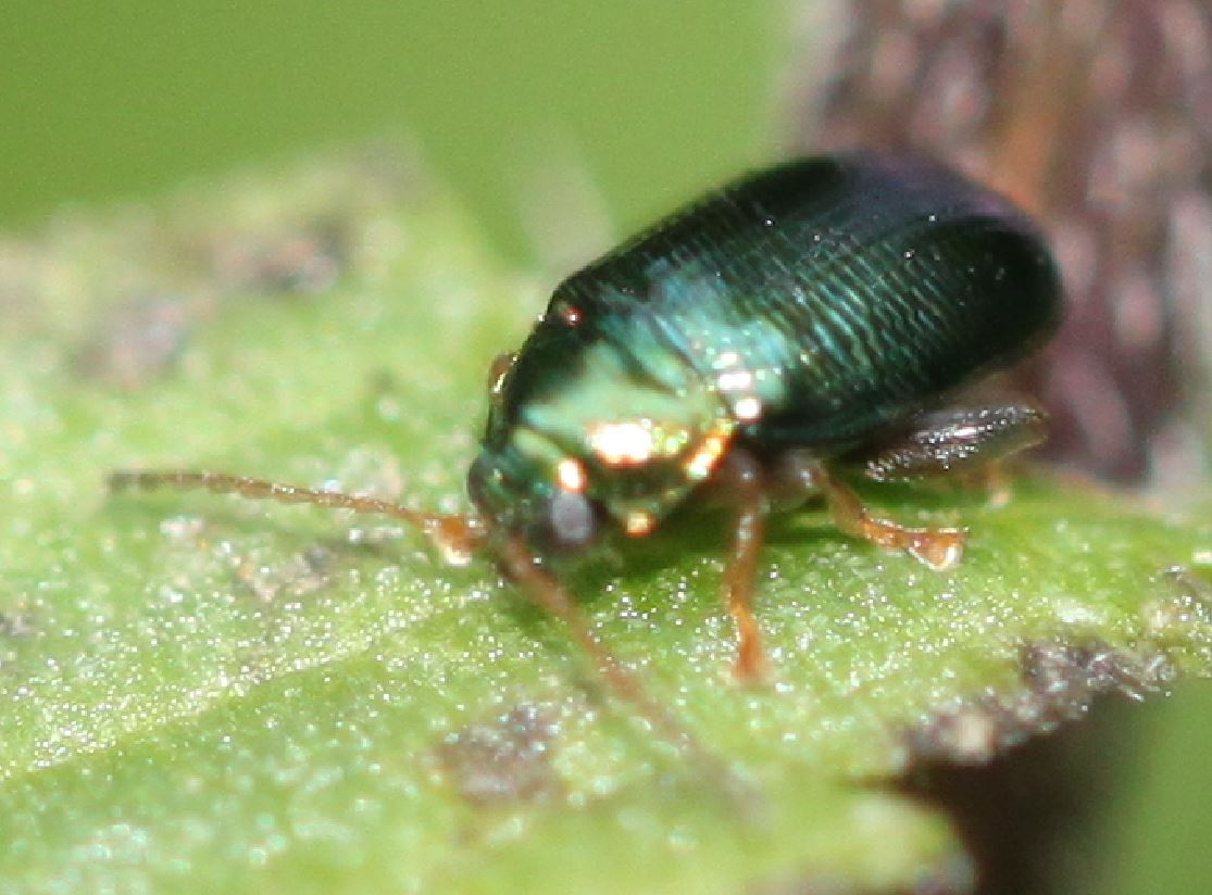 Flohkäfer Goldener Erdfloh (Crepidodera aurea) am 22.9.2016 in den Rheinauen "Schwetzinger Wiesen"